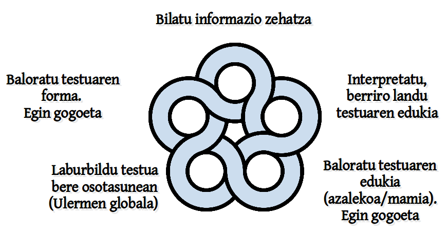 Testu bat lantzeko galdera mota asko egin daitezke. Egin daitezkeen galderekin bost talde egin izan dira, 5 galdera mota.